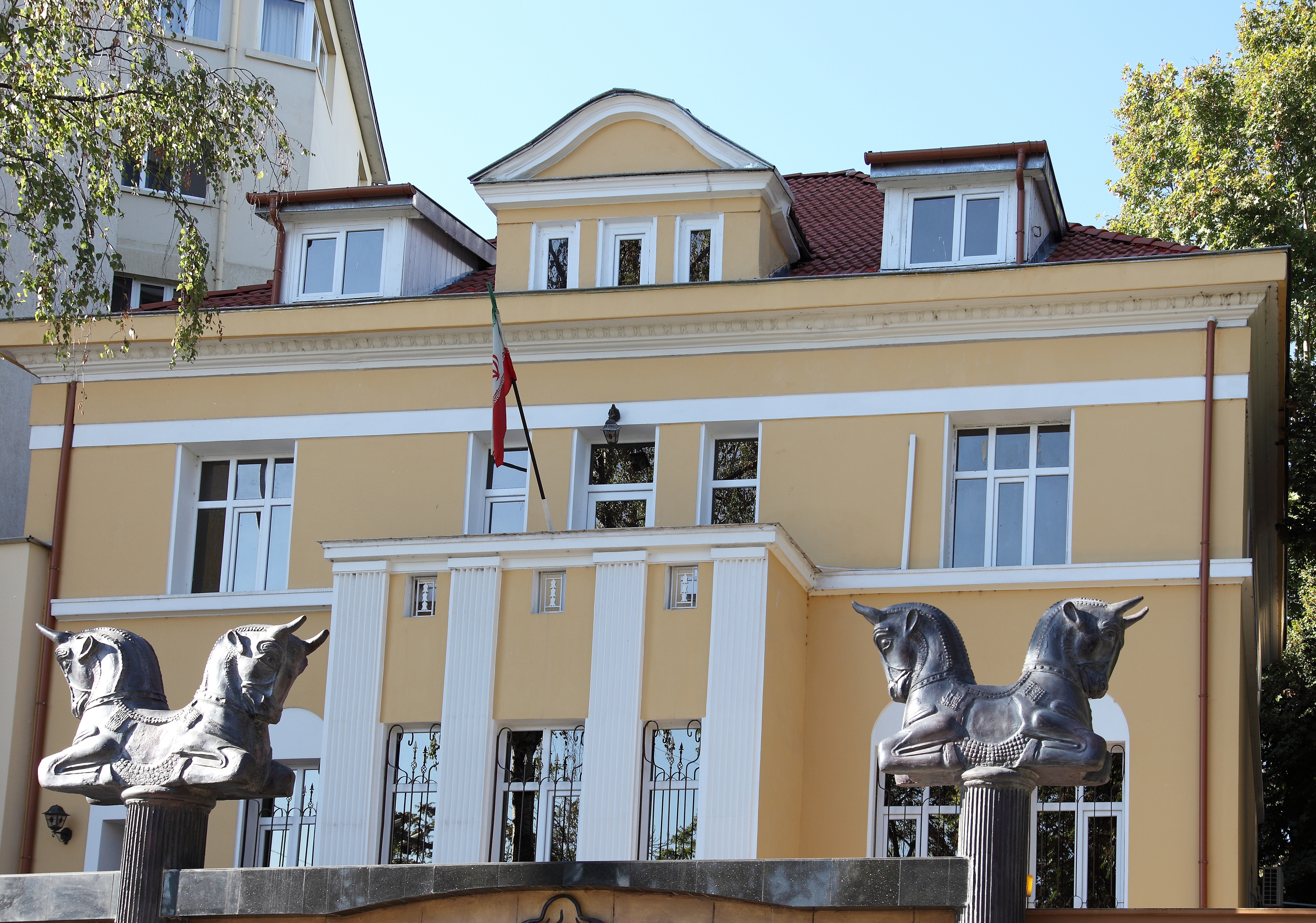 Iranisches Kultruzentrum in Sofia, in der Nähe der Adlerbrücke